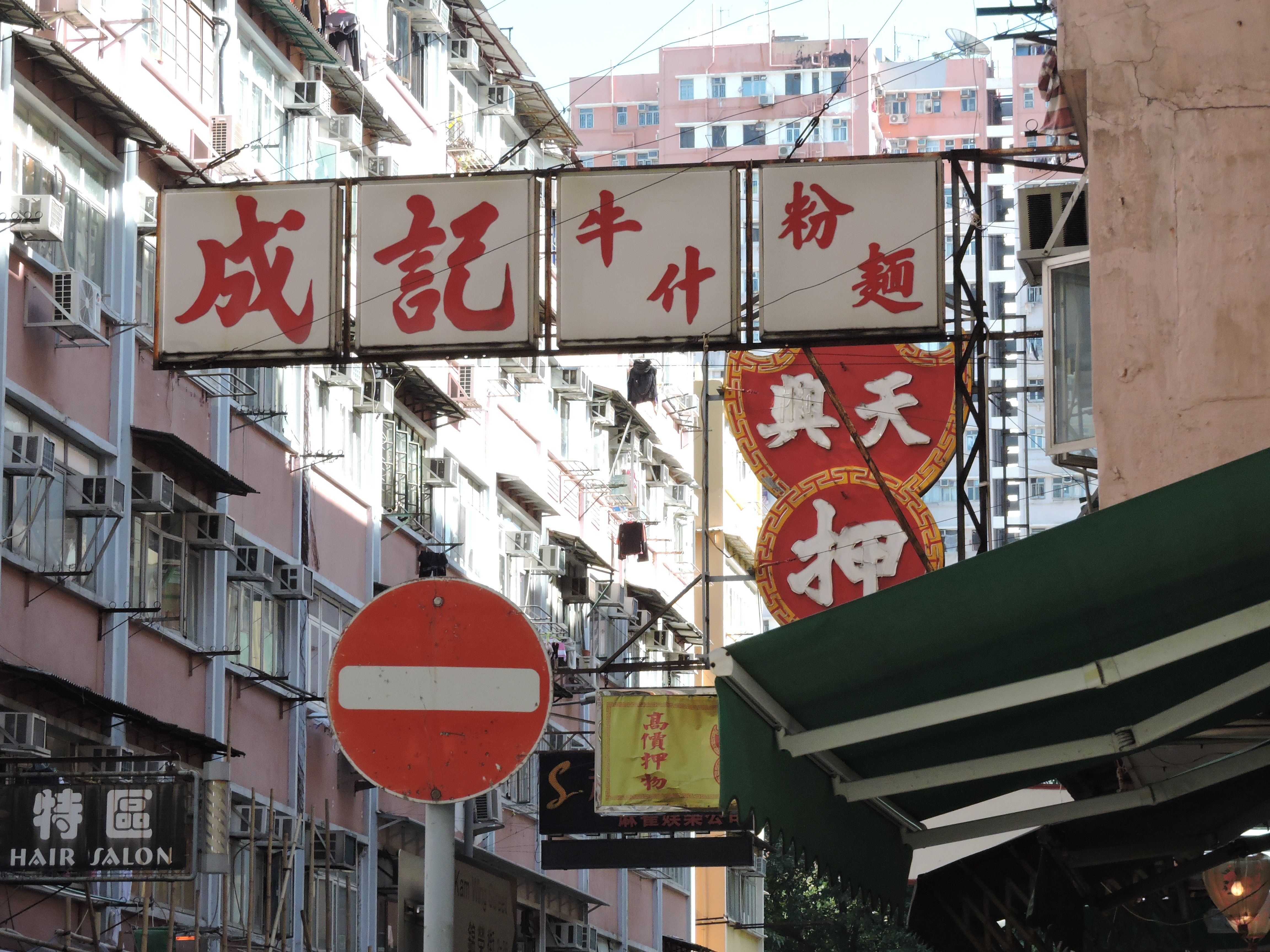 粵語: 李漢字招牌-成記牛什粉麪